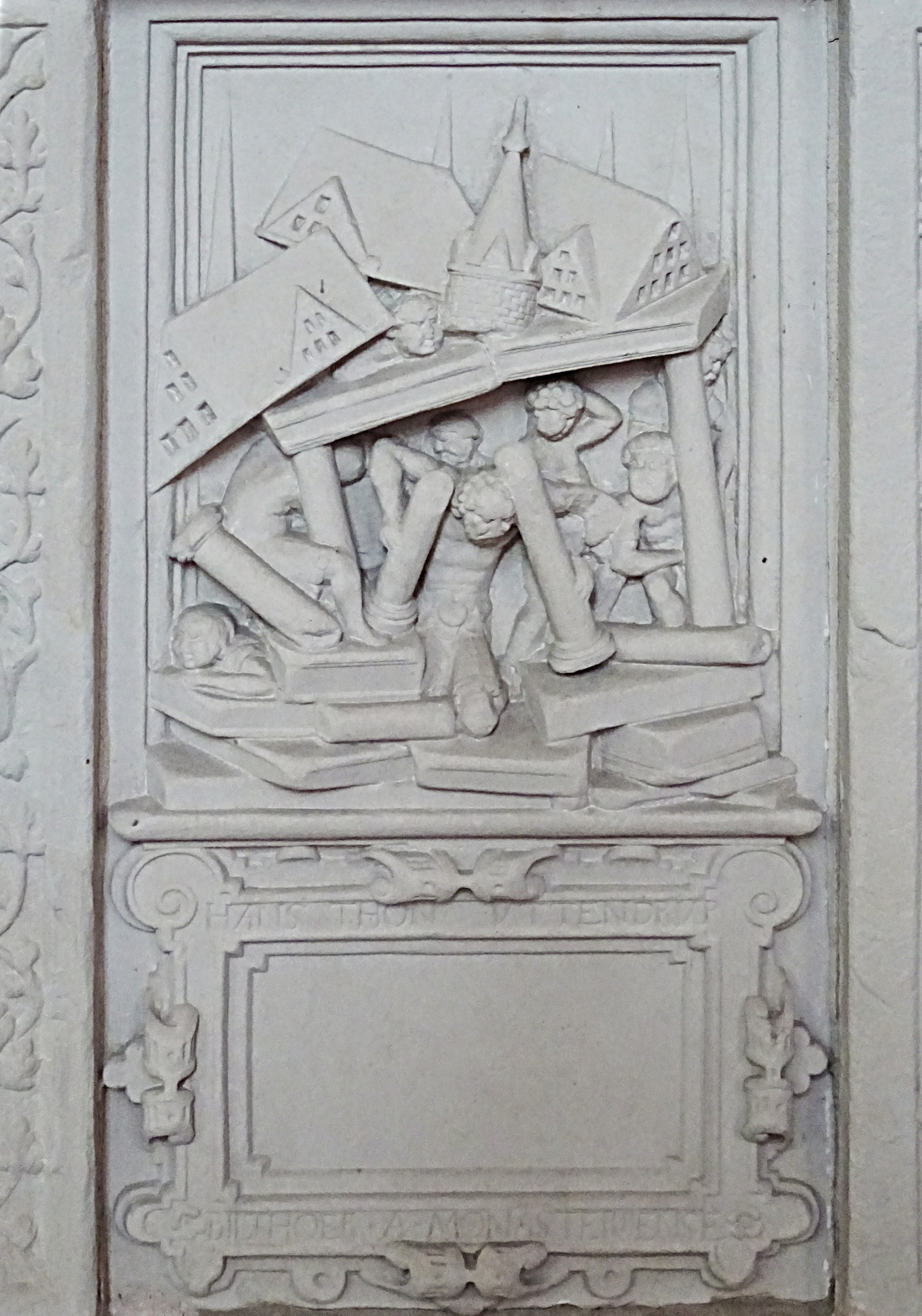 Steinbilderbibel in der St. Annenkirche (Eisleben), 25/29, Simsons Tod